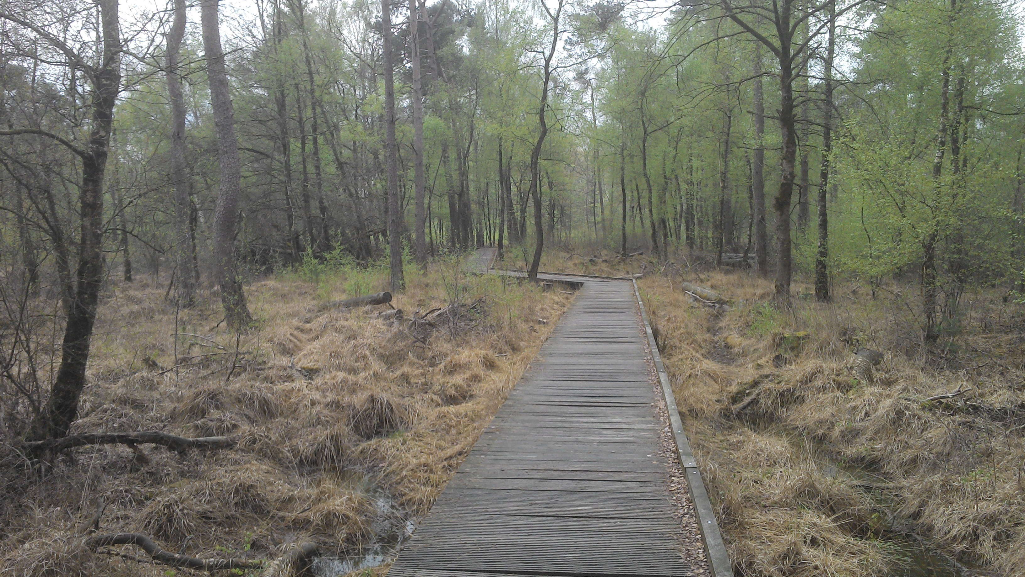 Bohlenweg im NSG Schwattet Gatt